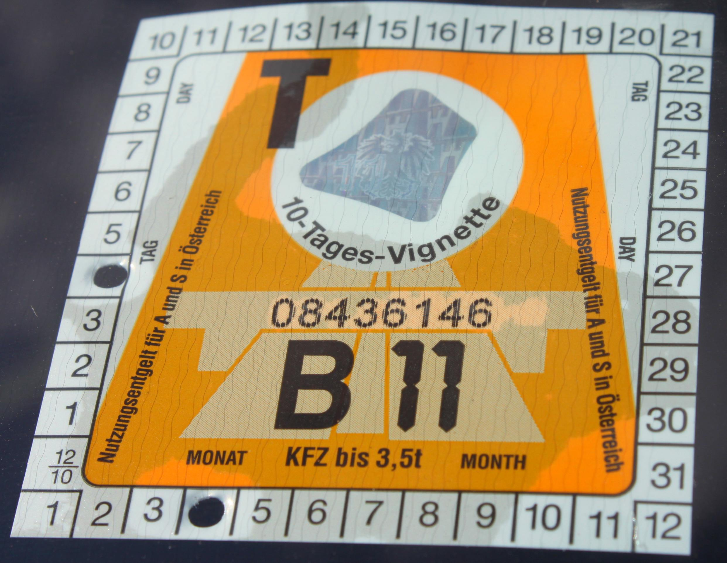 10-Tages-Autobahnvignette von Österreich